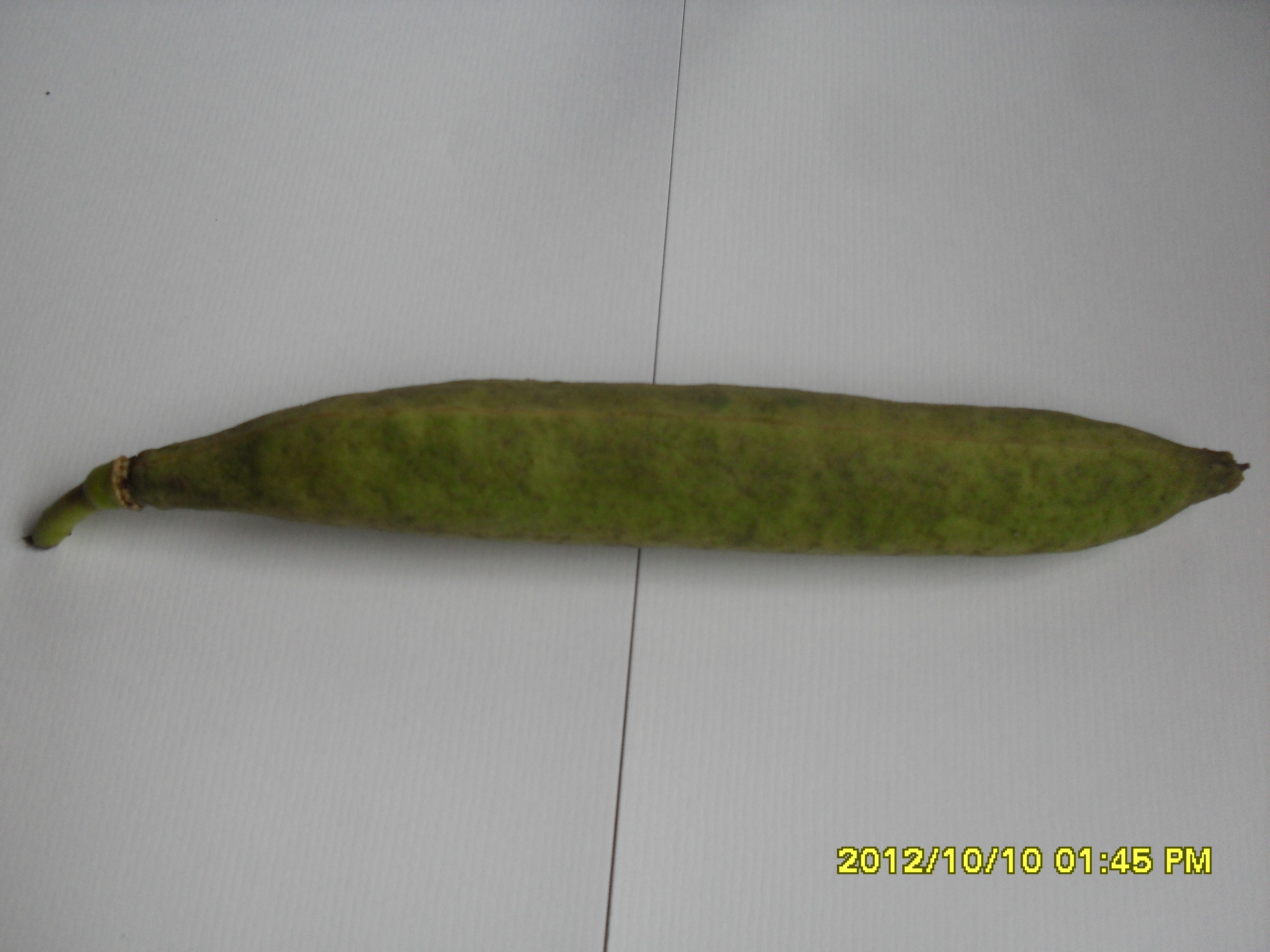 una cápsula de T.aurea sin abrir